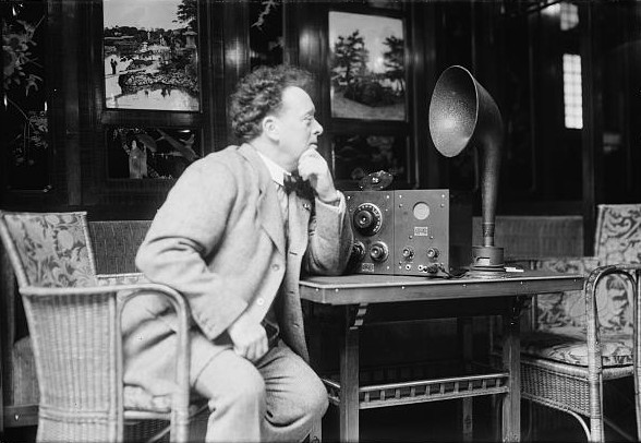 Willem Mengelberg (1871 – 1951), Dutch conductor